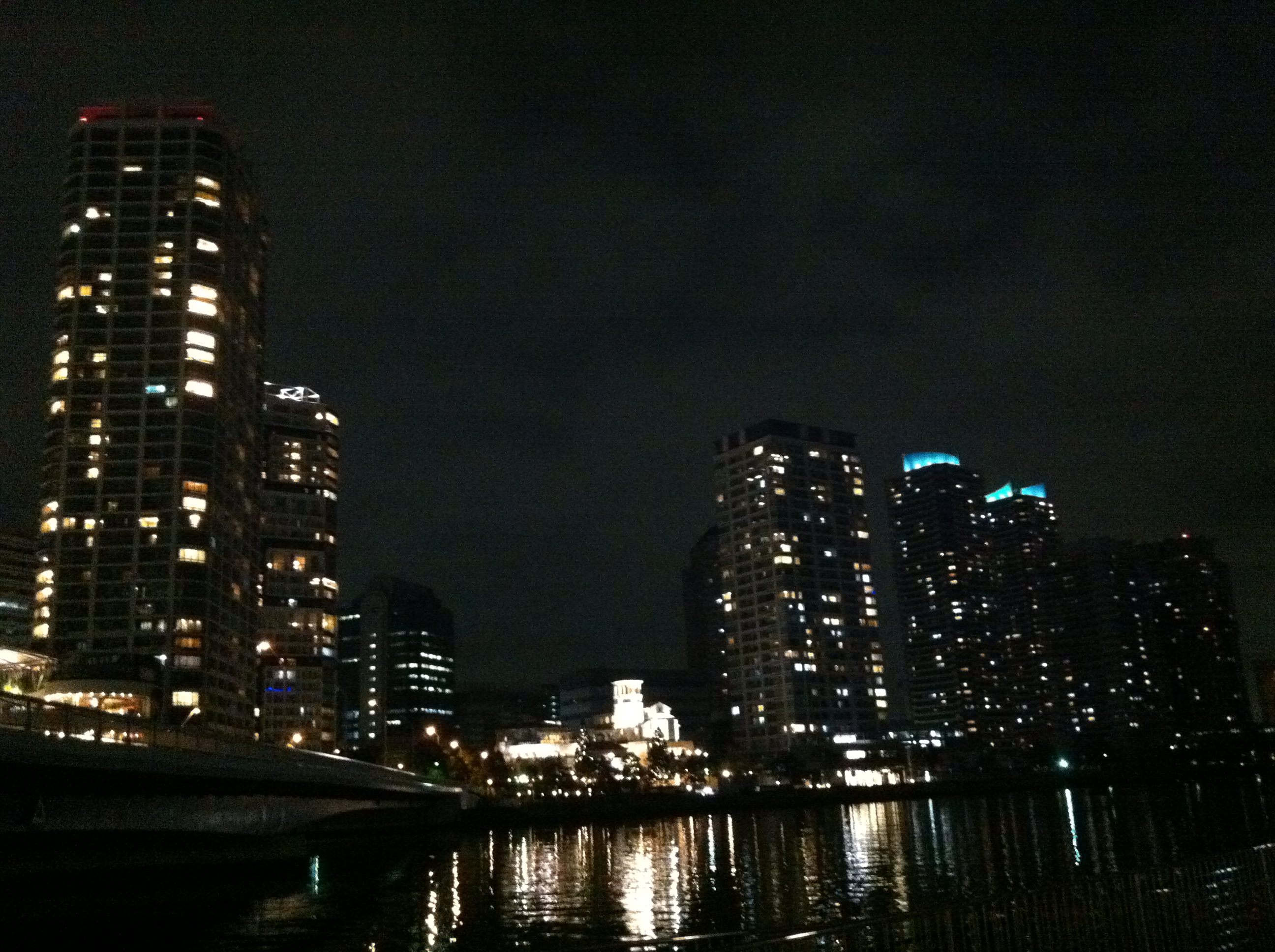 横浜市神奈川区のポートサイド地区。